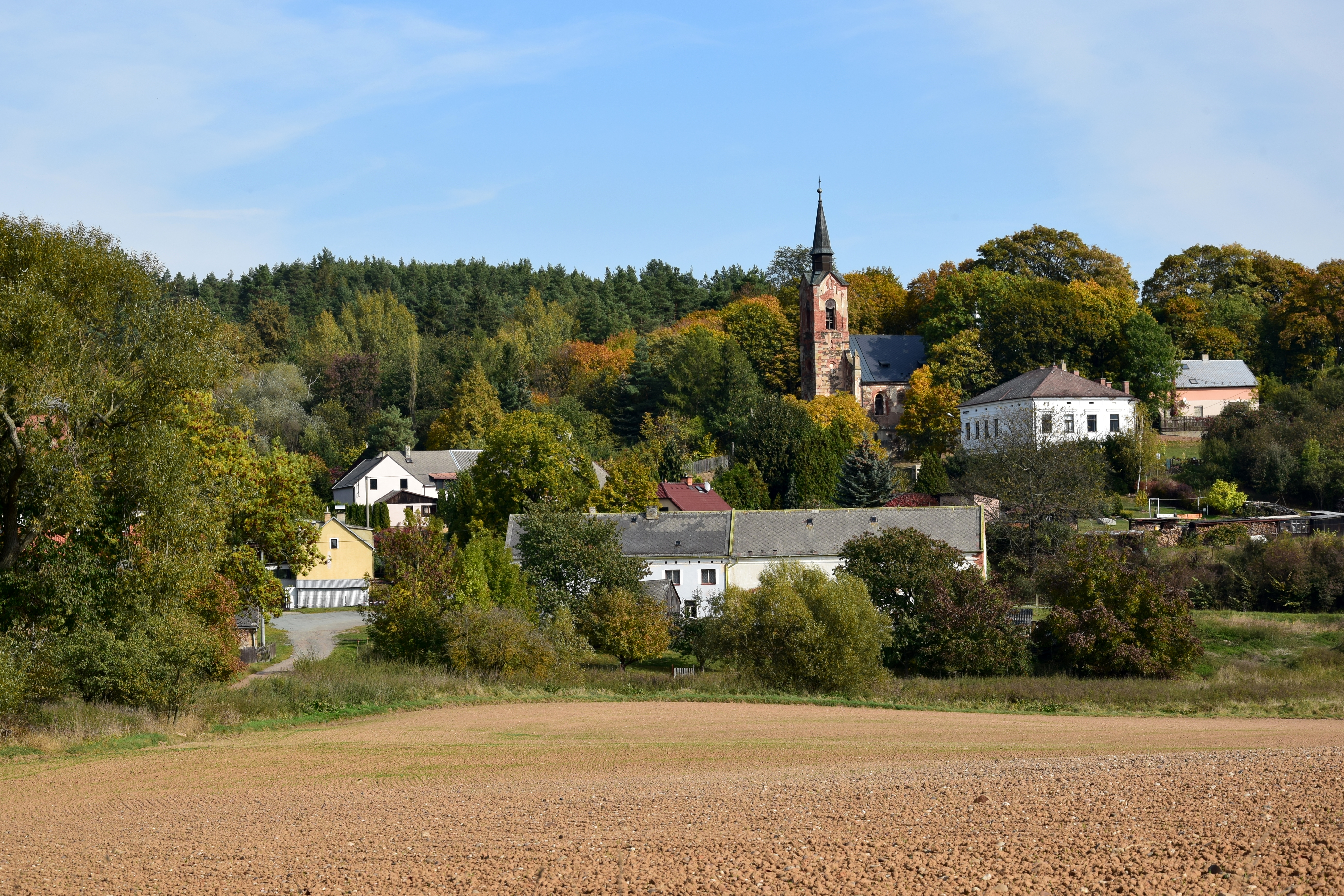 Luková – celkový pohled od jihozápadu